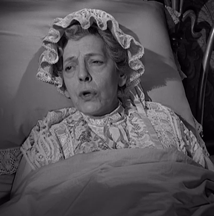 Tina Pica, screenshot da La nonna Sabella (1957) catturato personalmente